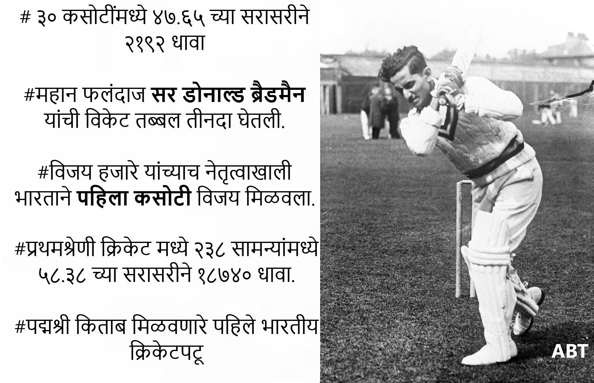 vijay hajare records and photo